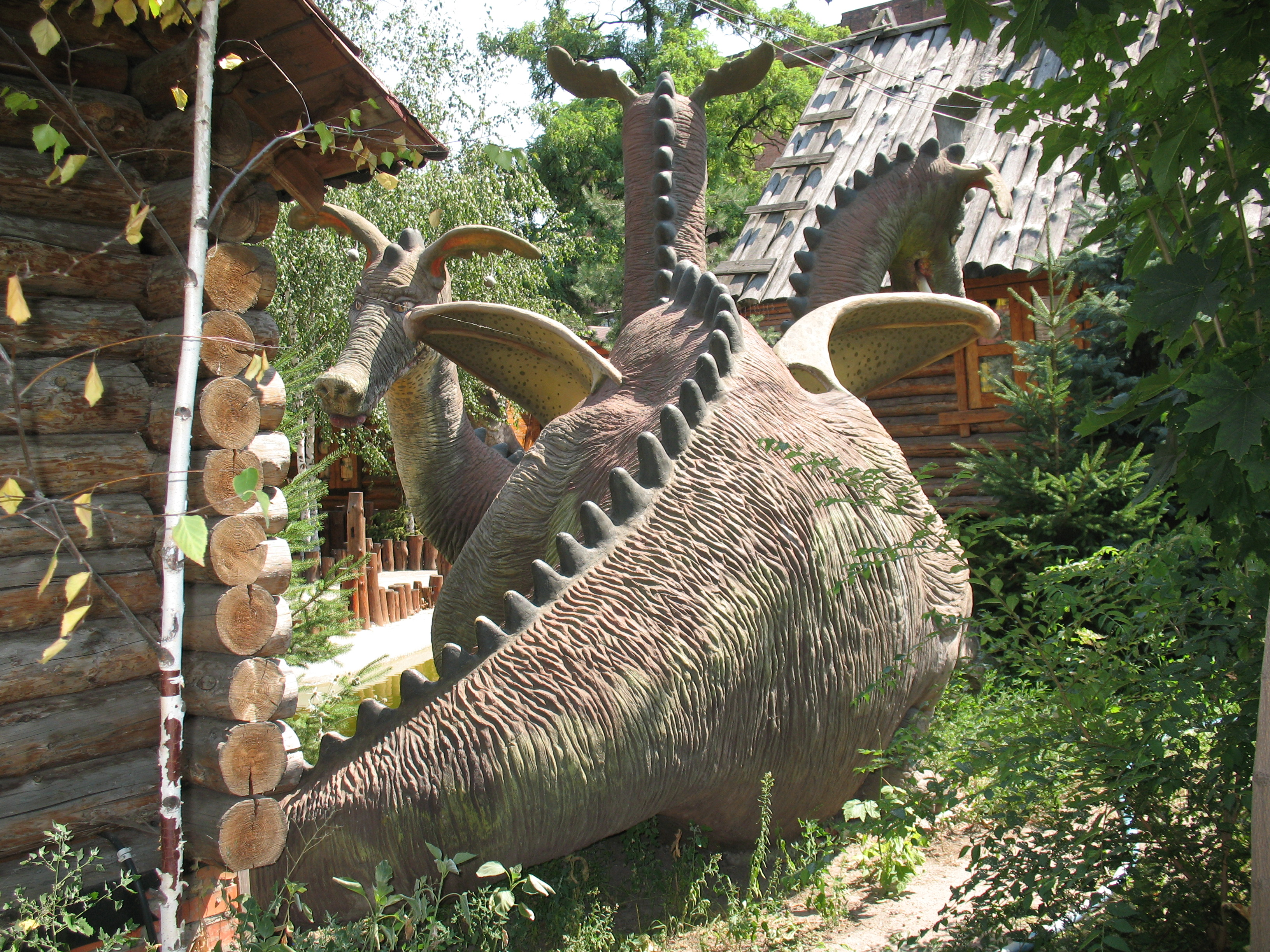 Змей Горыныч (деревянная скульптура) на набережной реки Лопань (левый берег реки, ул. Клочковская, 5). Харьков